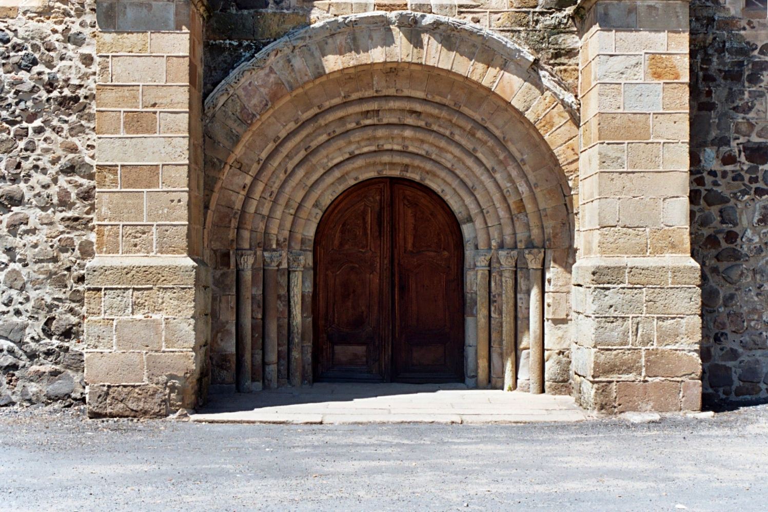 France - Auvergne - Puy-de-Dôme - Église Saint-Sébastien de Manglieu